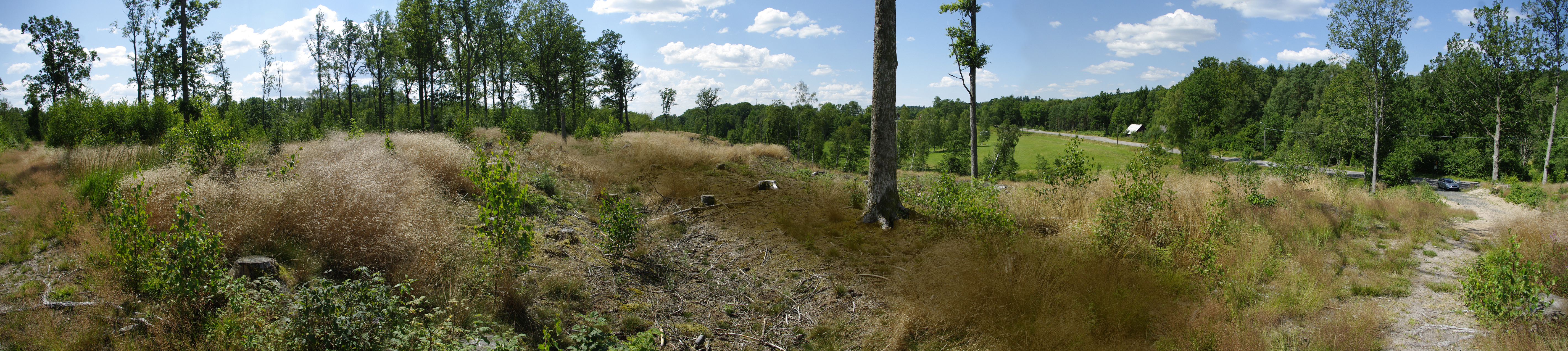 Örkelljunga skans från 1657.